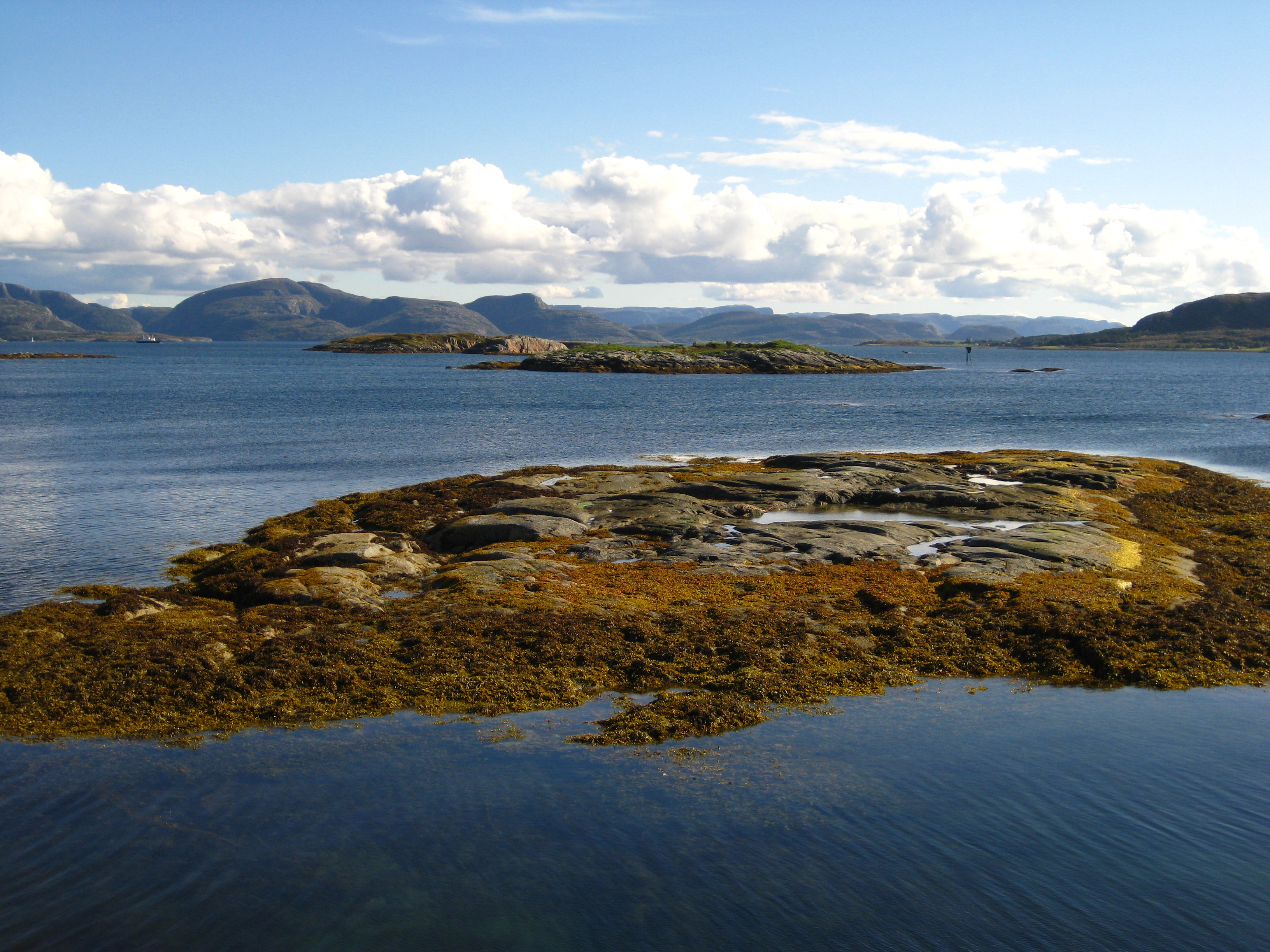 Linesoya